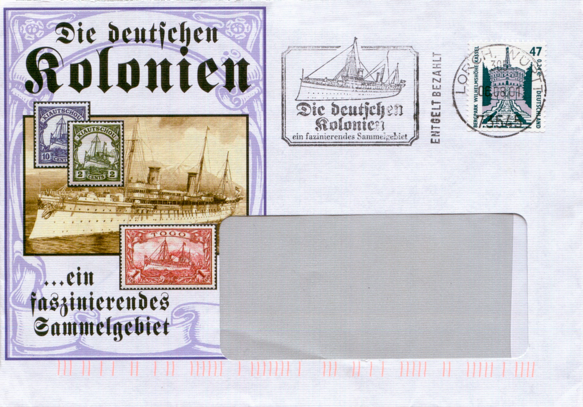 Brief (Massensendung zu ermäßigtem Entgelt) mit Absenderstempelung